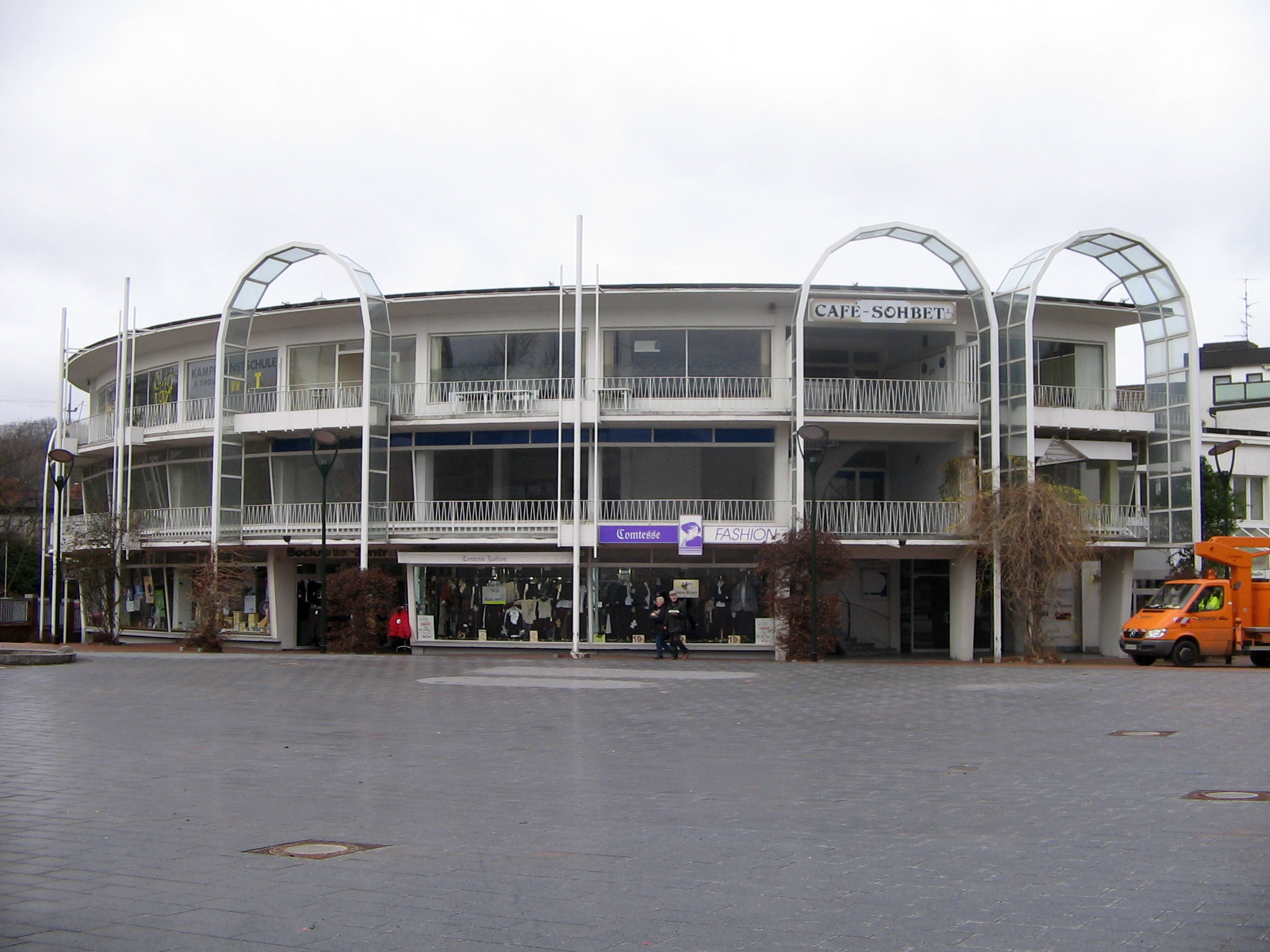 Ferdinand-Schmetz-Platz in Herzogenrath